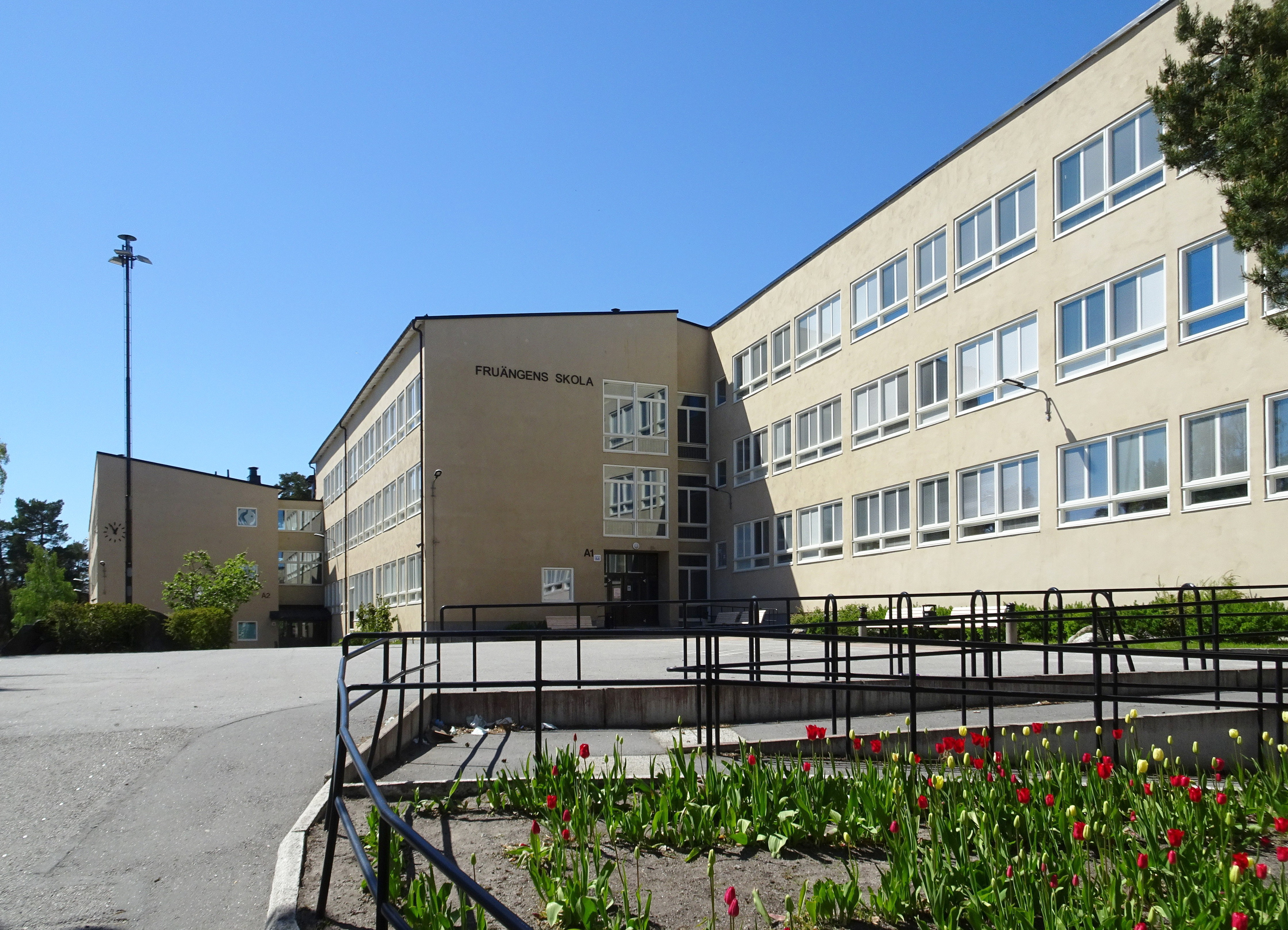 Fruängens skola. Nybyggnadsår 1956. Byggnadsfirman Nils Nessen (Byggmästare) Stockholms Folkskoledirektion (Byggherre) Stockholms skoldirektion, Byggnadsavdelningen (Trädgårdsarkitekt) Sven Tyrén (Konstruktör) Ture Ryberg (Arkitekt)